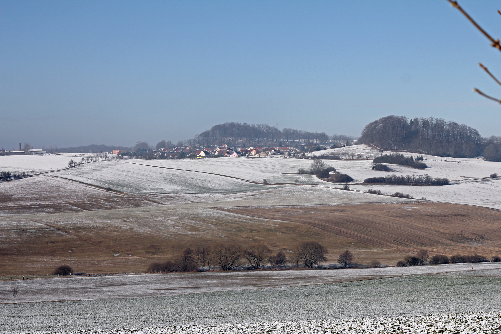 Worbis - Blick von der Hardt nach Kirchohmfeld im Eichsfeld